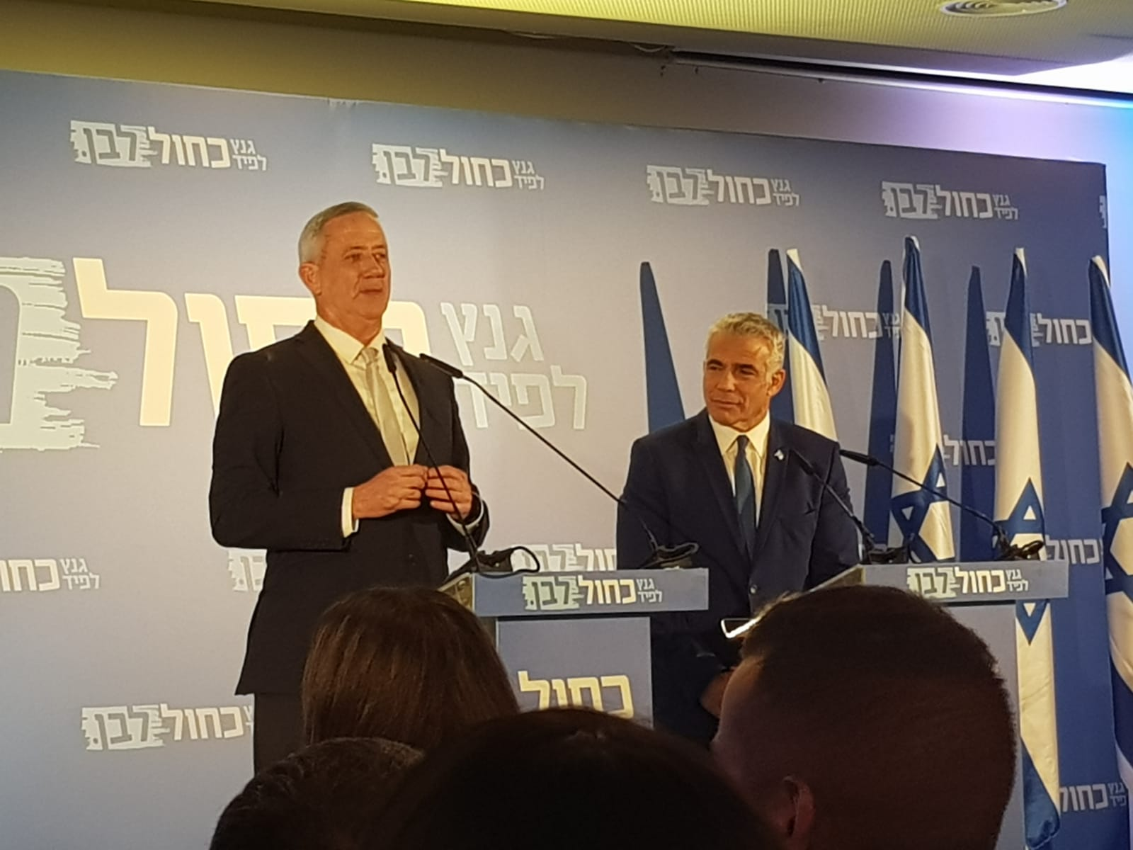 מסיבת עיתונאים, מפלגת כחול לבן, יאיר לפיד ובני גנץ